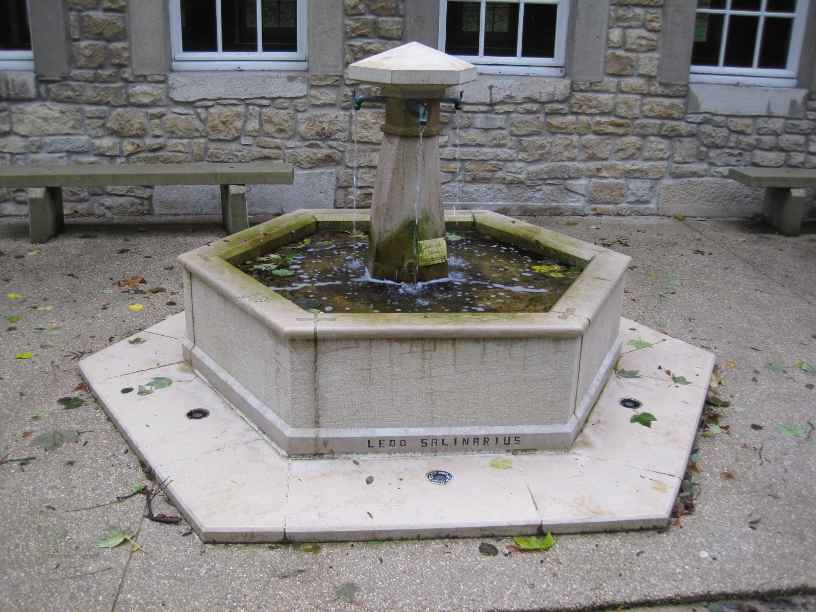 Salines de Lons-le-Saunier : source du puis salé et source Lédonia, rue du puits salé à Lons-le-Saunier